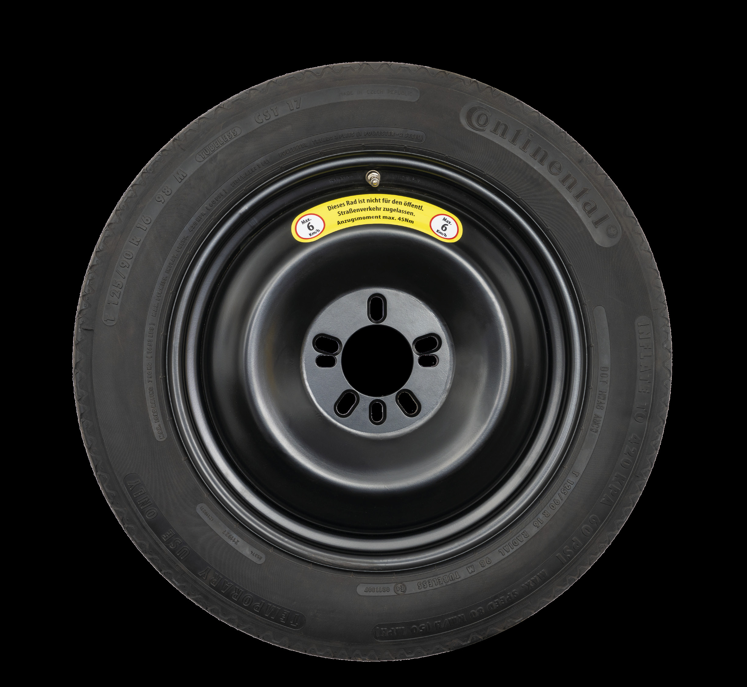 Universal-Lackierrad 16 Zoll